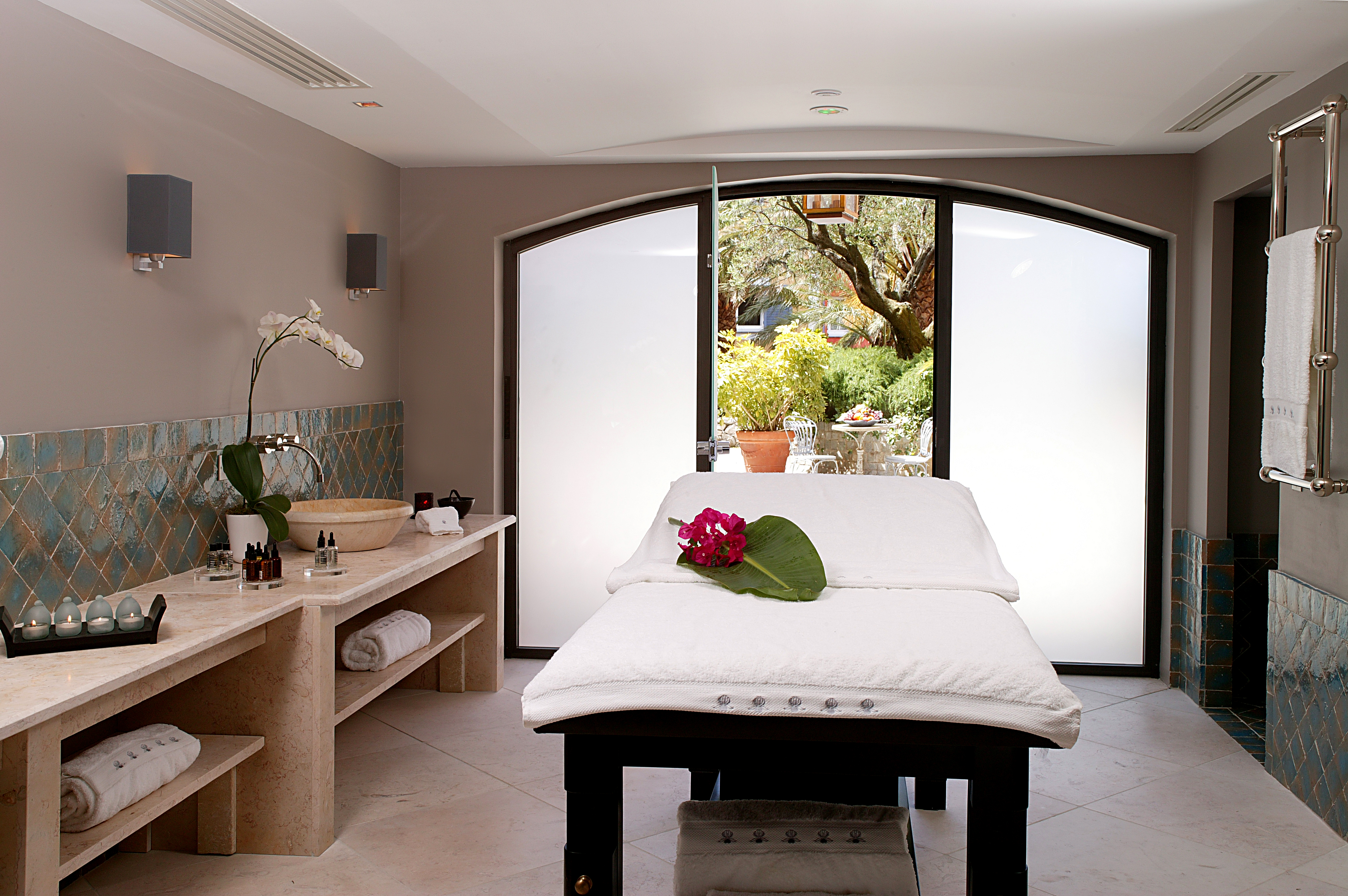 Des produits d’un luxe authentique et des protocoles de soins exceptionnels